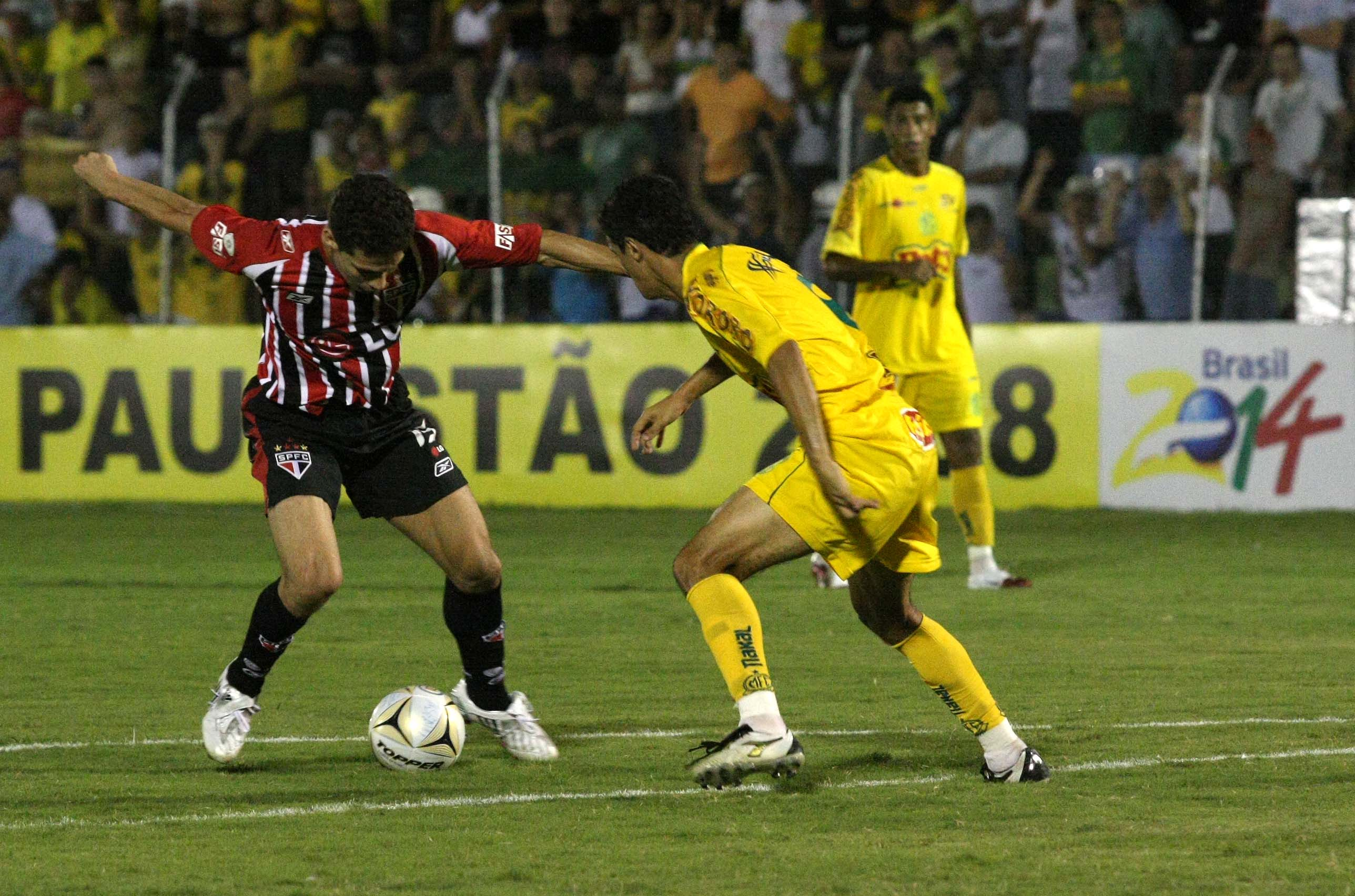 Hernanes do São Paulo em lance na partida.